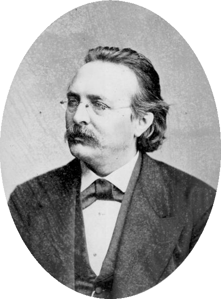 Carl Franz Edmund Kretschmer (* 31. August 1830 in Ostritz/Lausitz; † 13. September 1908 in Dresden) war ein deutscher Organist und Komponist.